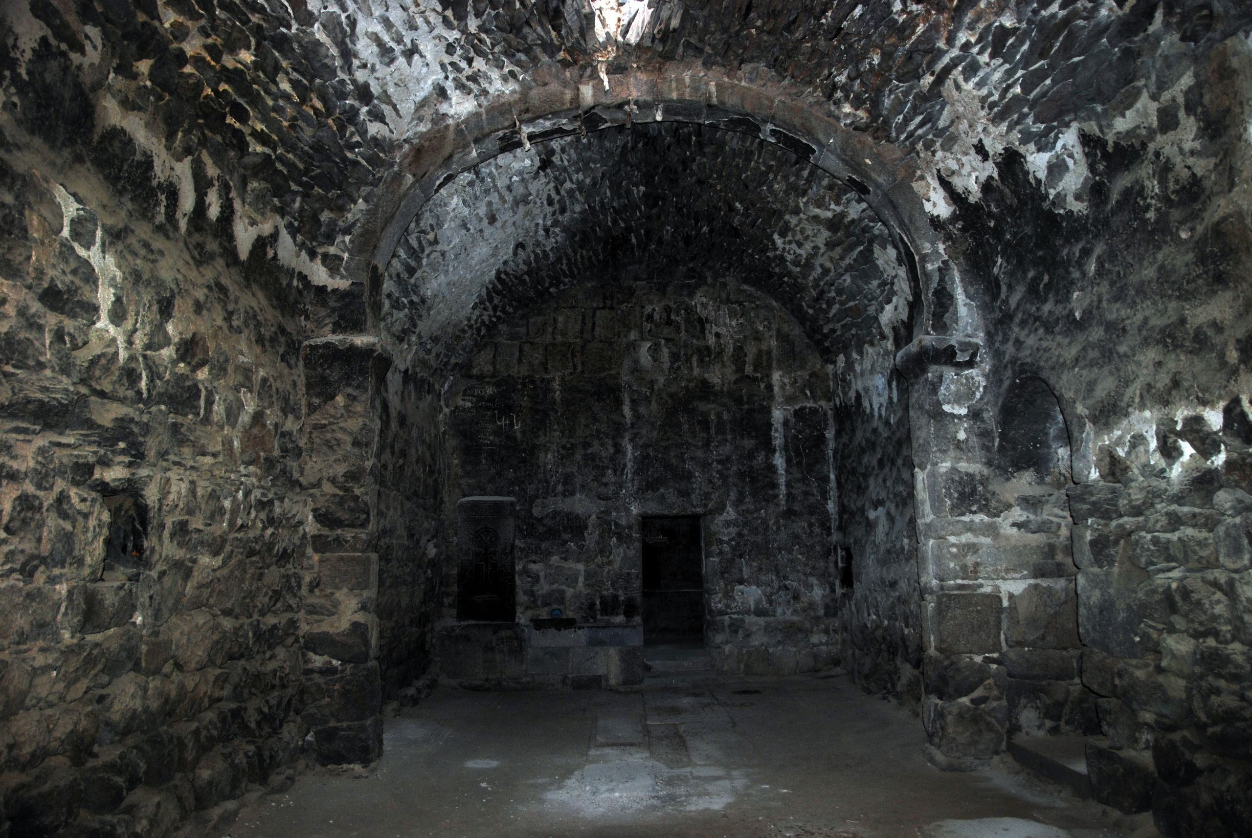 Vorotnavank, gavit Surp Stephanos